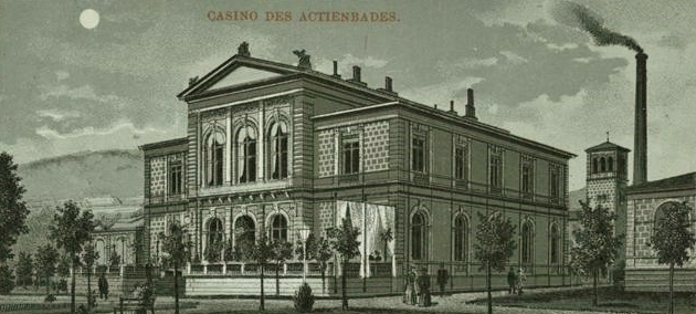 Das staatliche Spielcasino am Bad Kissinger Luitpoldbad um 1900